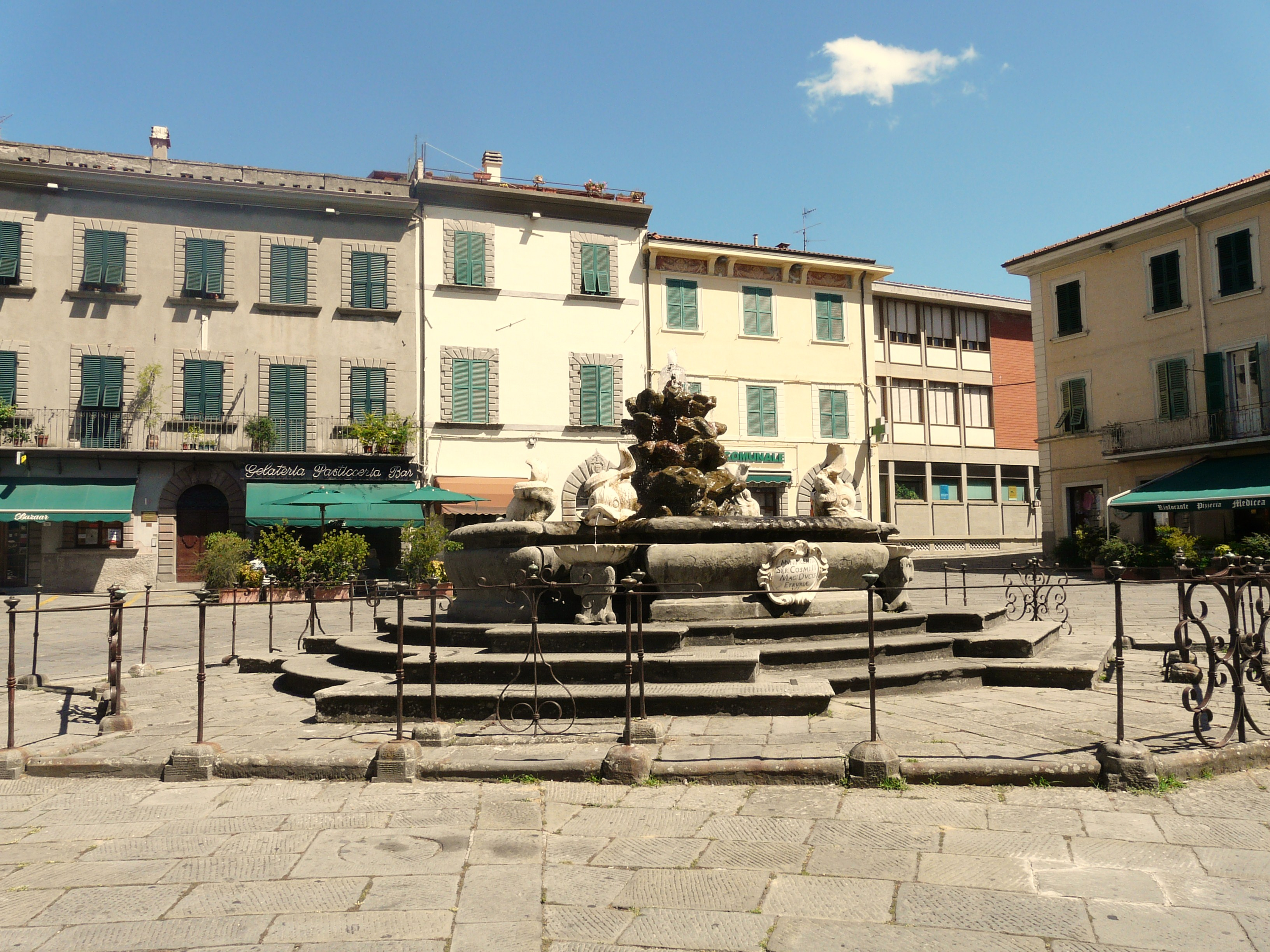 Piazza Medicea, Fivizzano, Toscana, Italia